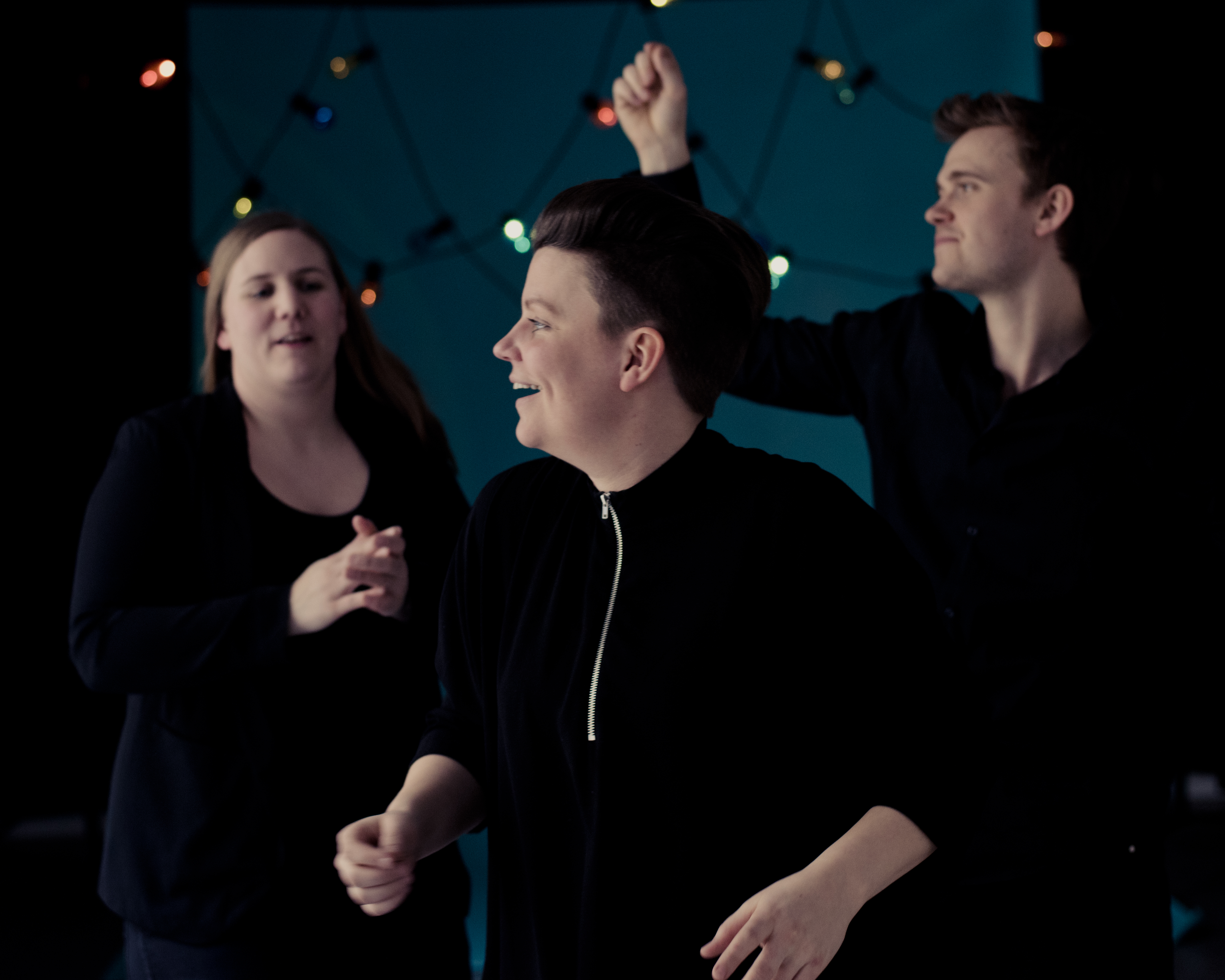 foto : Helle Frogner